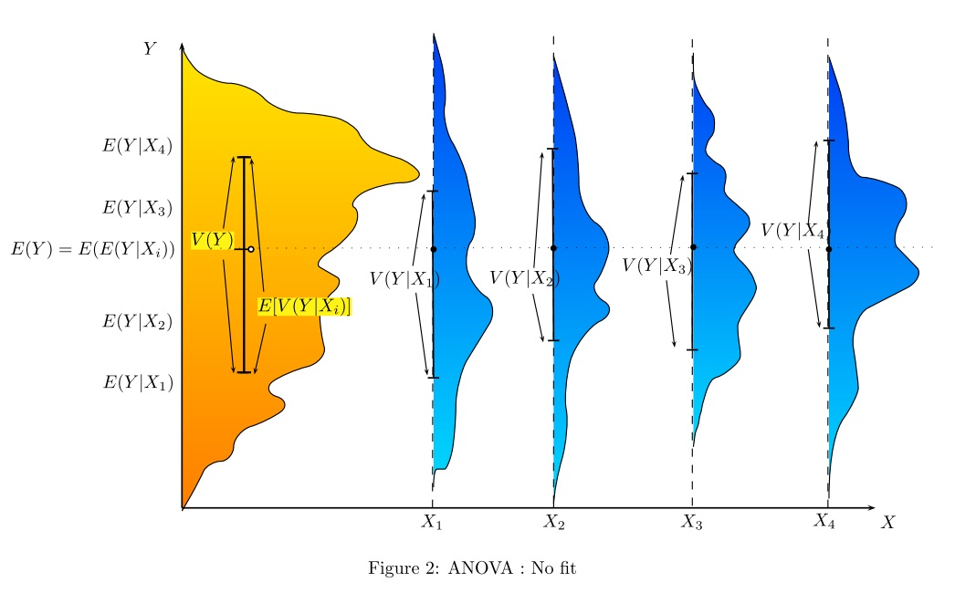 A representation of a situation with a fair fit in terms of ANOVA statistics